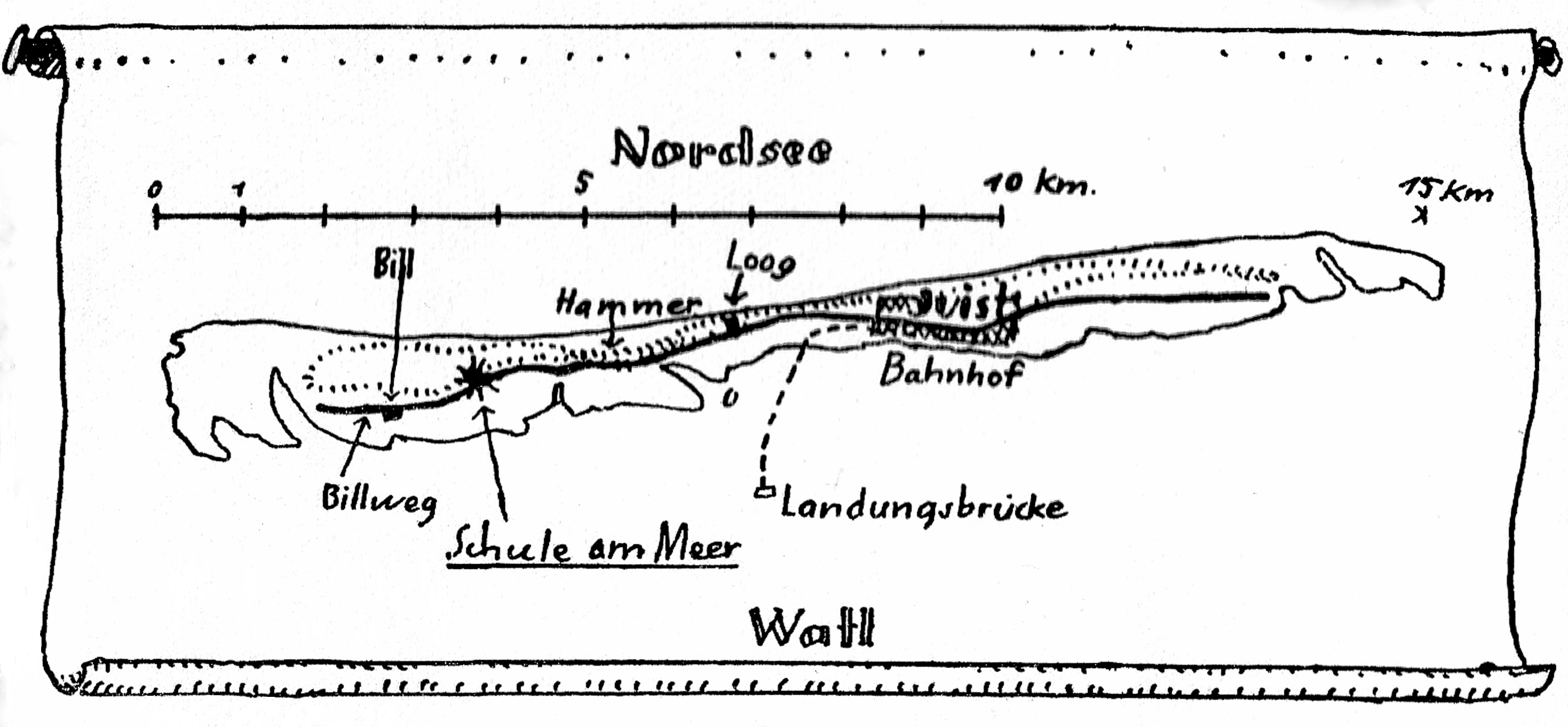 Zeichnung der Nordseeinsel Juist (Ostfriesland) aus dem Jahr 1924. Die Lageskizze weist den ursprünglich geplanten Standort für die Schule am Meer aus, der an der Ostseite der Augustendüne (auch: Augustadüne) im Westen der Insel vorgesehen war. Zu dieser Zeit bestand der Hammersee noch nicht, der sich erst ab November 1930 nach einer großen Sturmflut im Bereich des in der Skizze markierten Hammers gebildet hatte. Dort, wo der Zeichner das Loog markiert hat, befindet sich der später tatsächlich realisierte Standort der Schule am Meer.